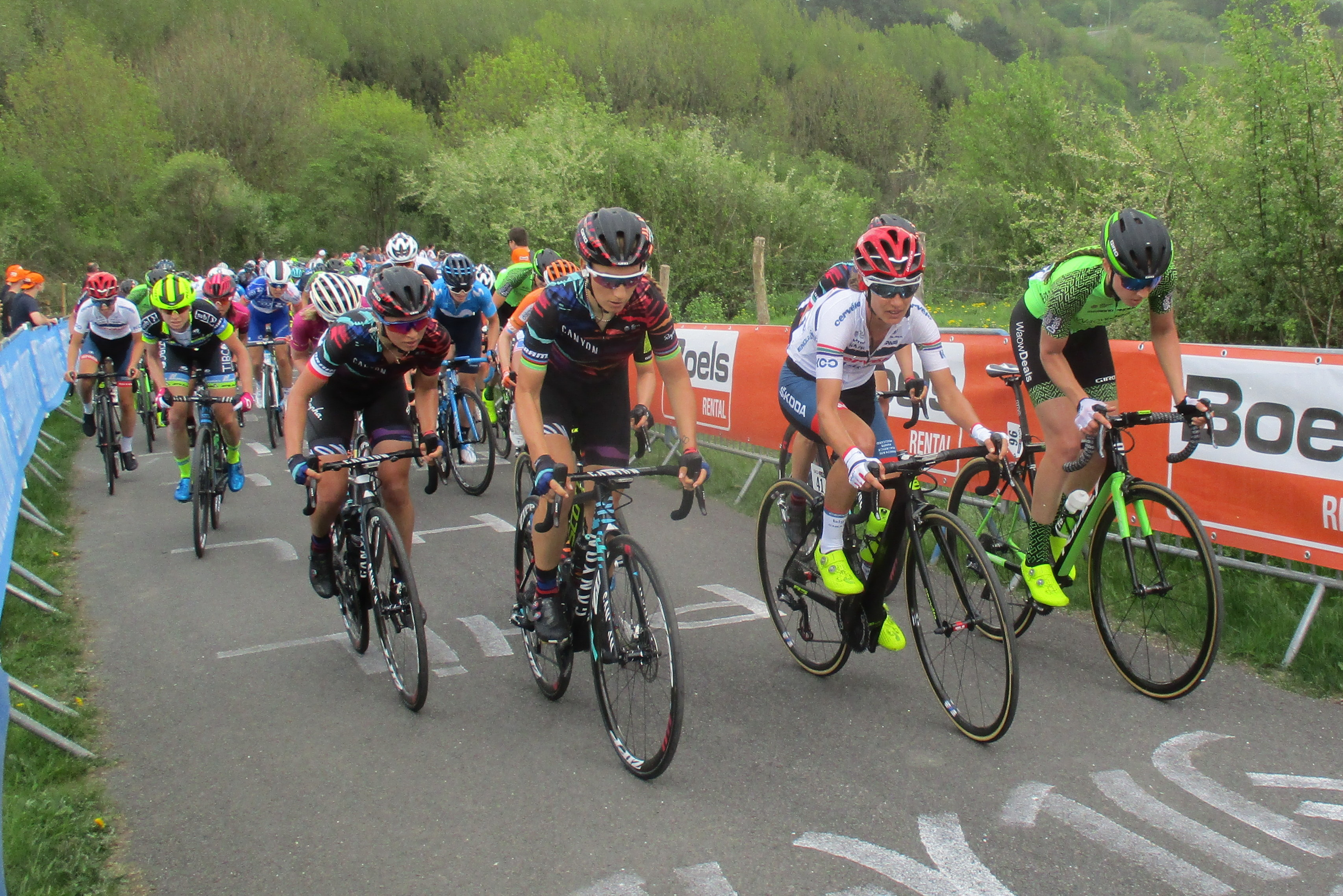 Beklimming van La Redoute tijdens Luik-Bastenaken-Luik 2018 voor vrouwen.